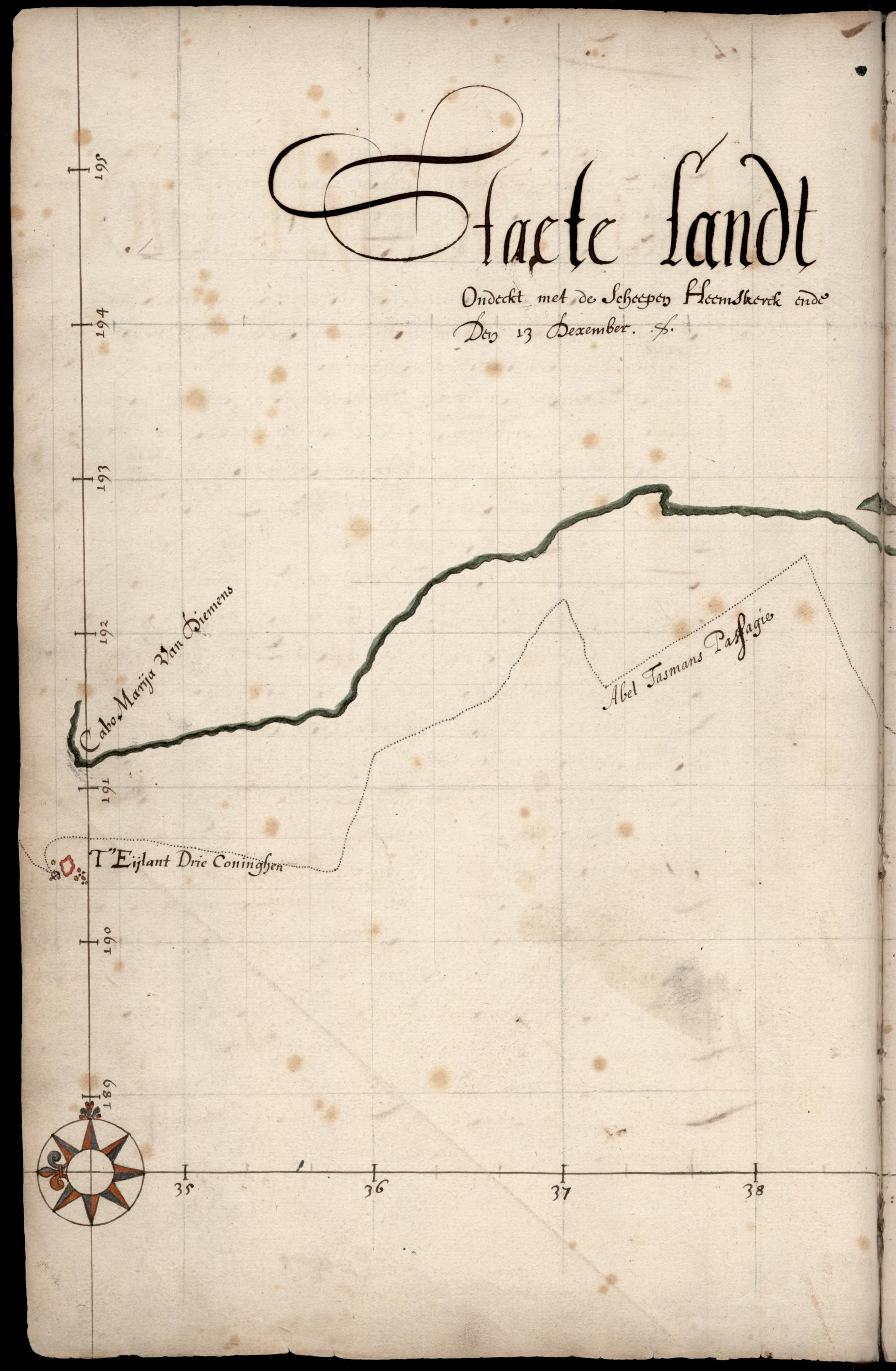 Journaal van Abel Tasman Jansz., 1642 Journal of Abel Tasman, 1642